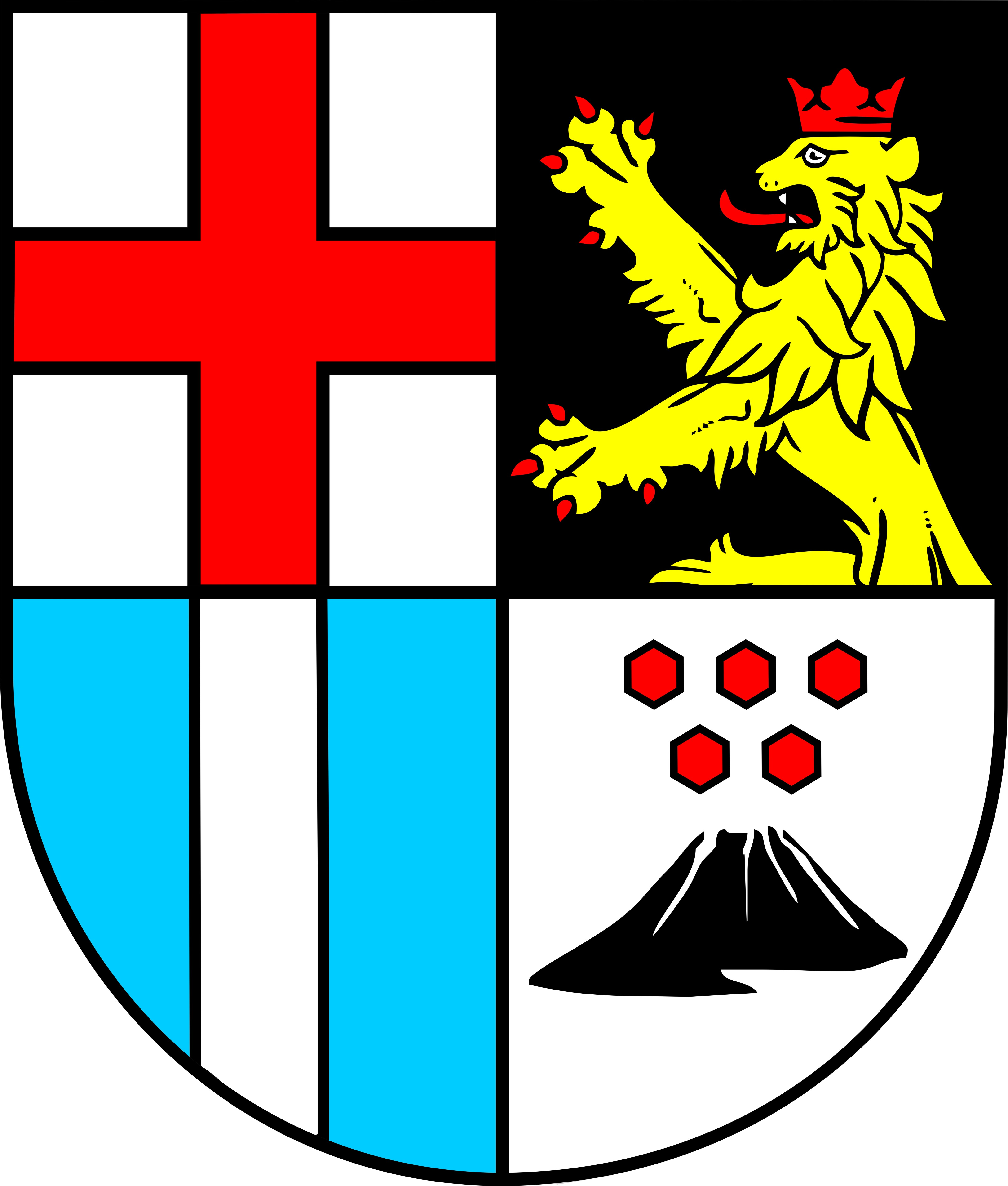 Neues Wappen der Verbandsgemeinde Pellenz